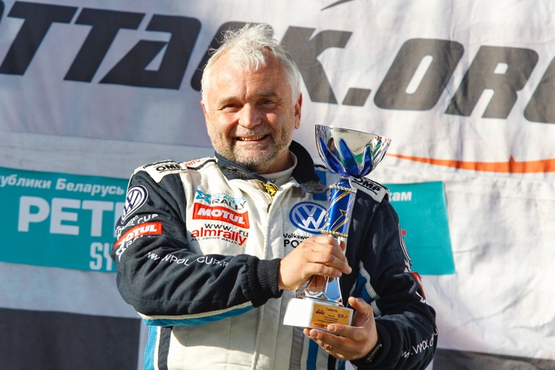 Пилот Антон Захаров